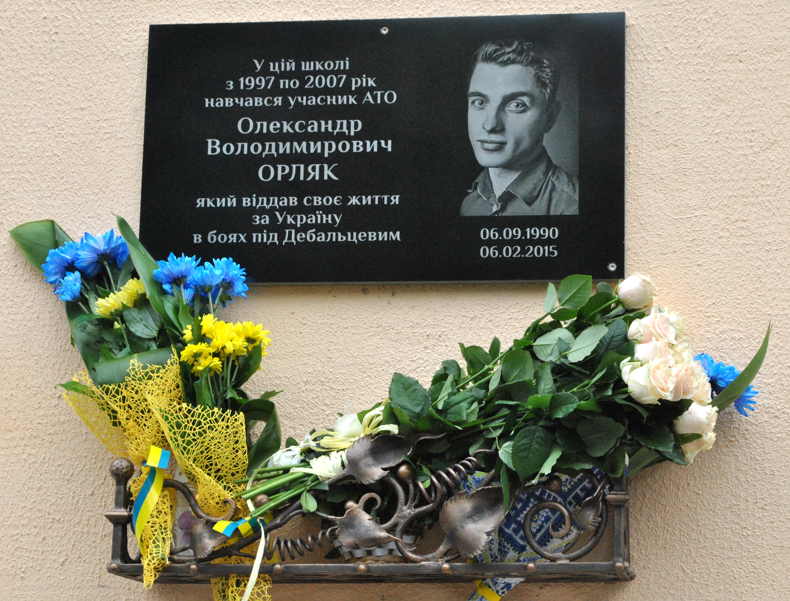 Пам'ятна дошка українському військовику, який загинув у зоні АТО, Олександрові Орляку на фасаді Тернопільської школи № 5.